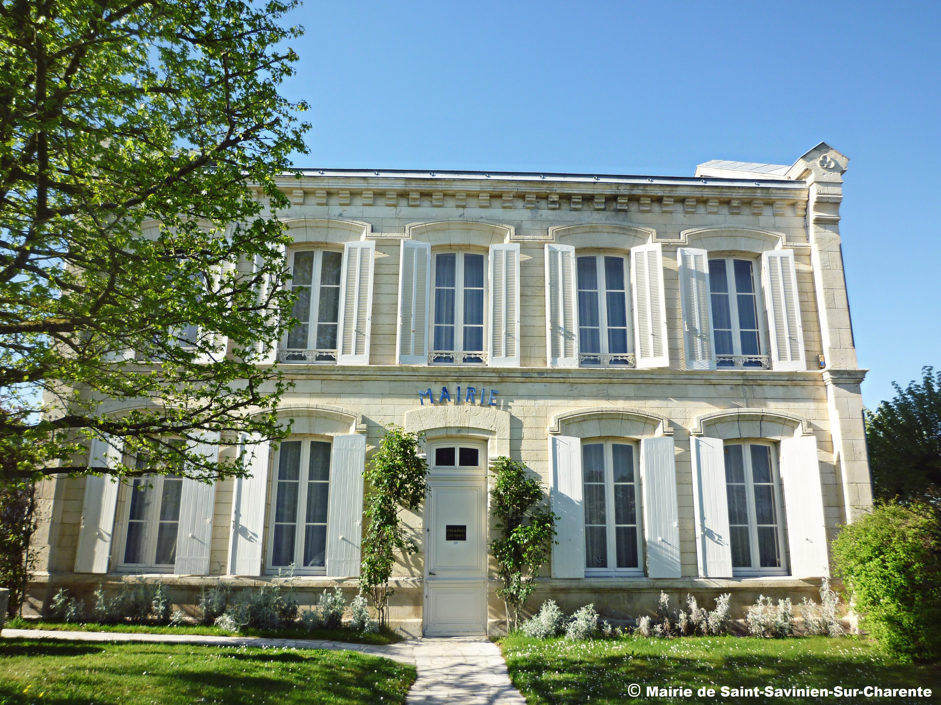 © Saint-Savinien-Sur-Charente